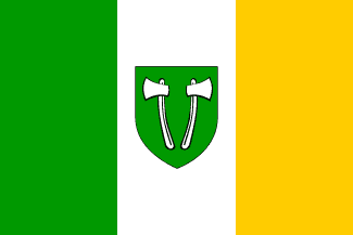 Publiek domein: gemeentevlag Beilen; NB, gemeente Beilen is overgegaan in gemeente Middenveld, hierbij is de gemeentevlag en gemeentewapen vervallen.